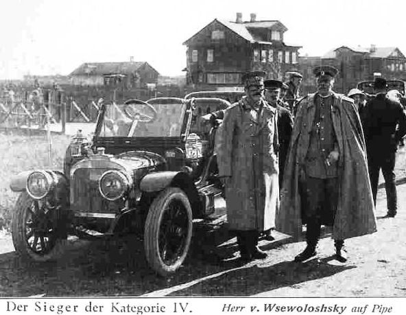 В. П. Всеволoжскoй y автомобиля Pipe 12/24 СV, автопробег Петербург — Рига — Петербург